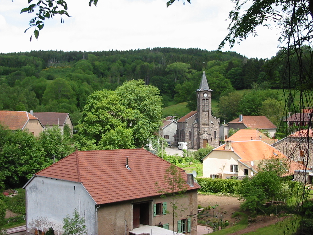 Châtas Commune du canton de Senones (Vosges) Photo personnelle du 4 juin 2006. Copyright © Christian Amet